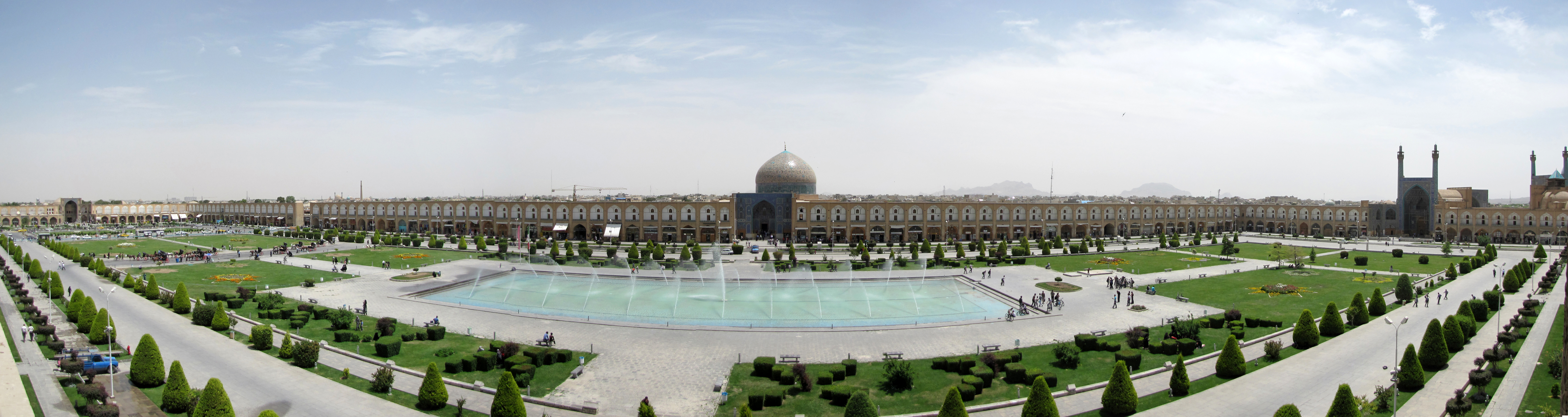 میدان شاه/ امام خمینی/ نقش جهان